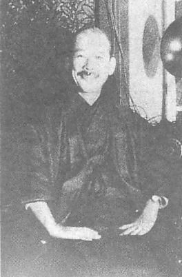 An seismologist from Japan,今村明恒（Akitsune Imamura）